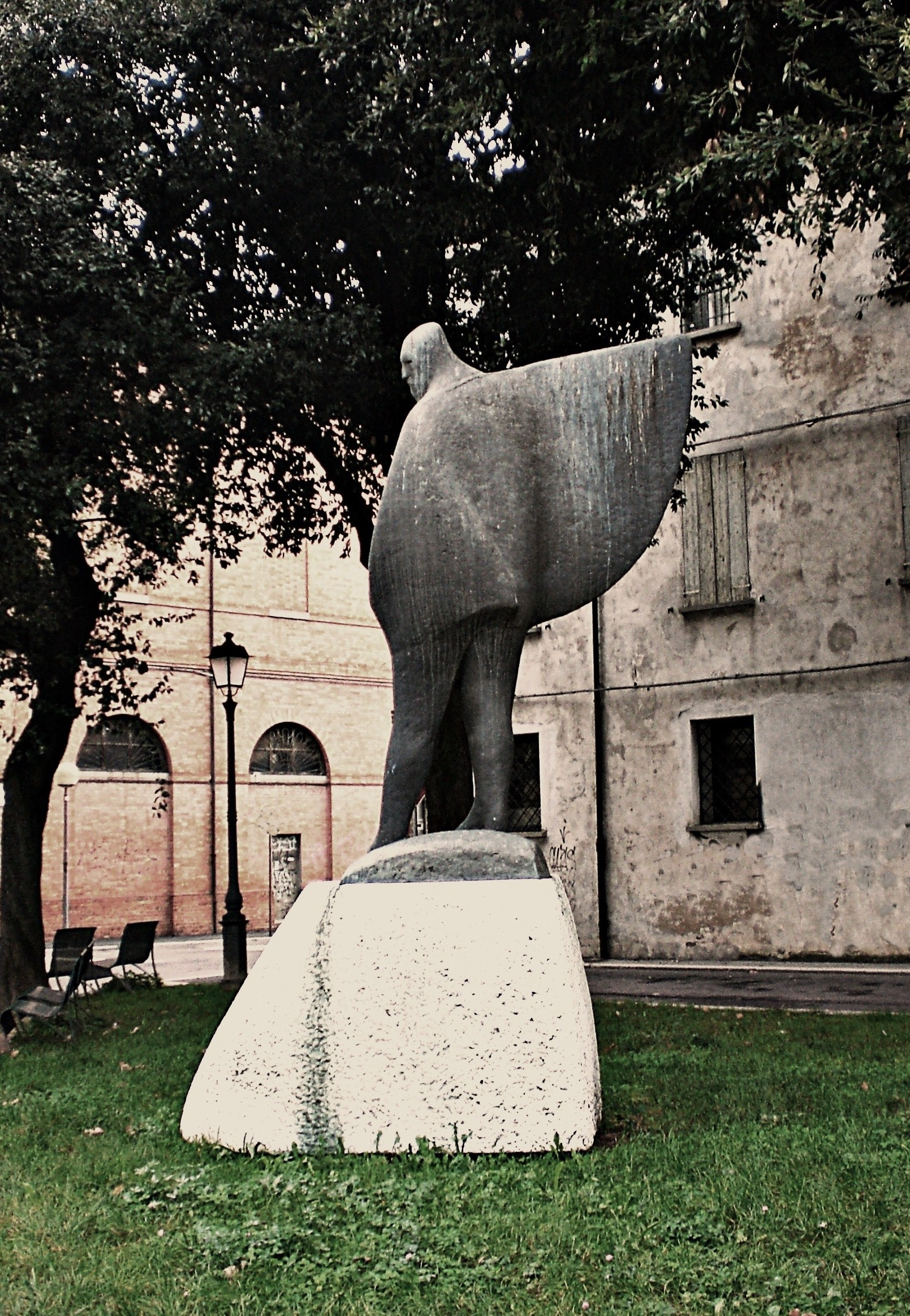 Museo all'aperto di opere di arte contemporanea This is a photo of a monument which is part of cultural heritage of Italy.